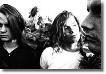 Wastland (Band)